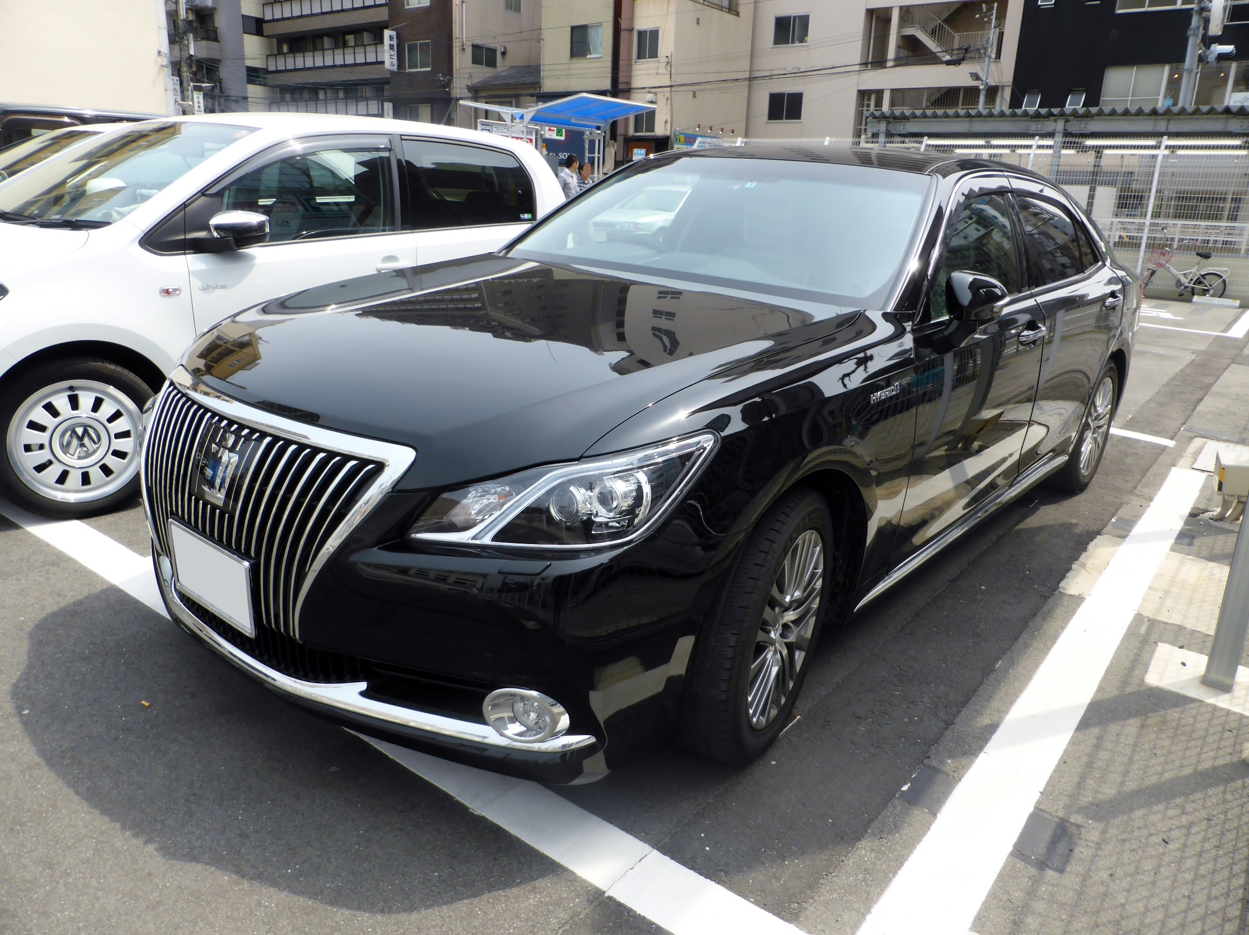 S214型トヨタ・クラウンマジェスタ"Fバージョン"をフロントから撮影。